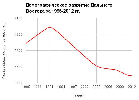 Демографическое развитие Дальнего Востока за 1985-2012 гг.